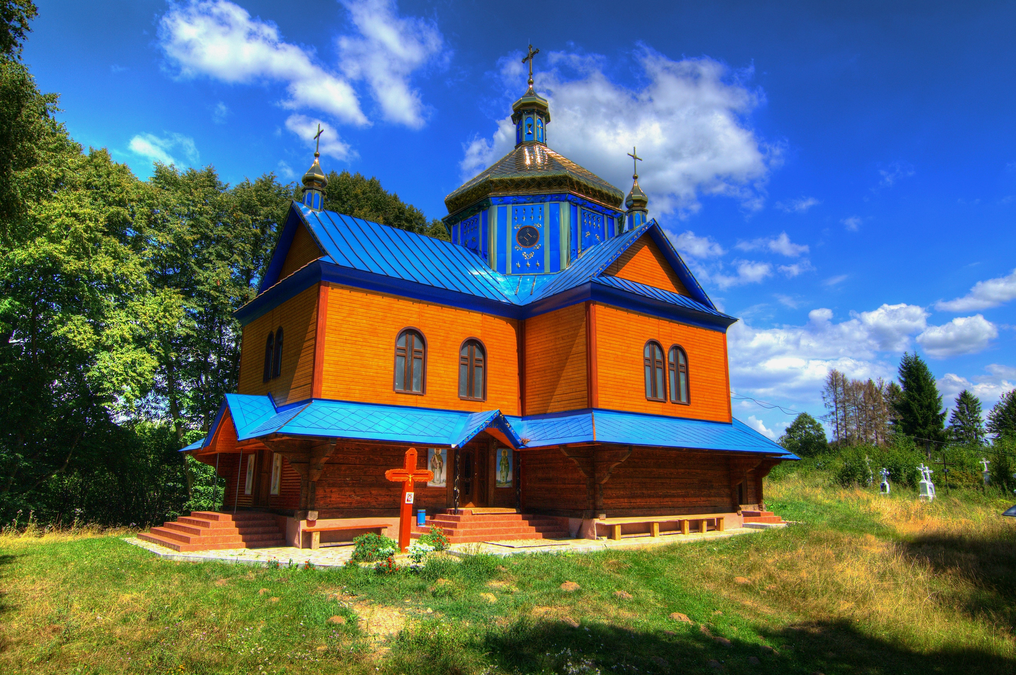 Жидачівського району